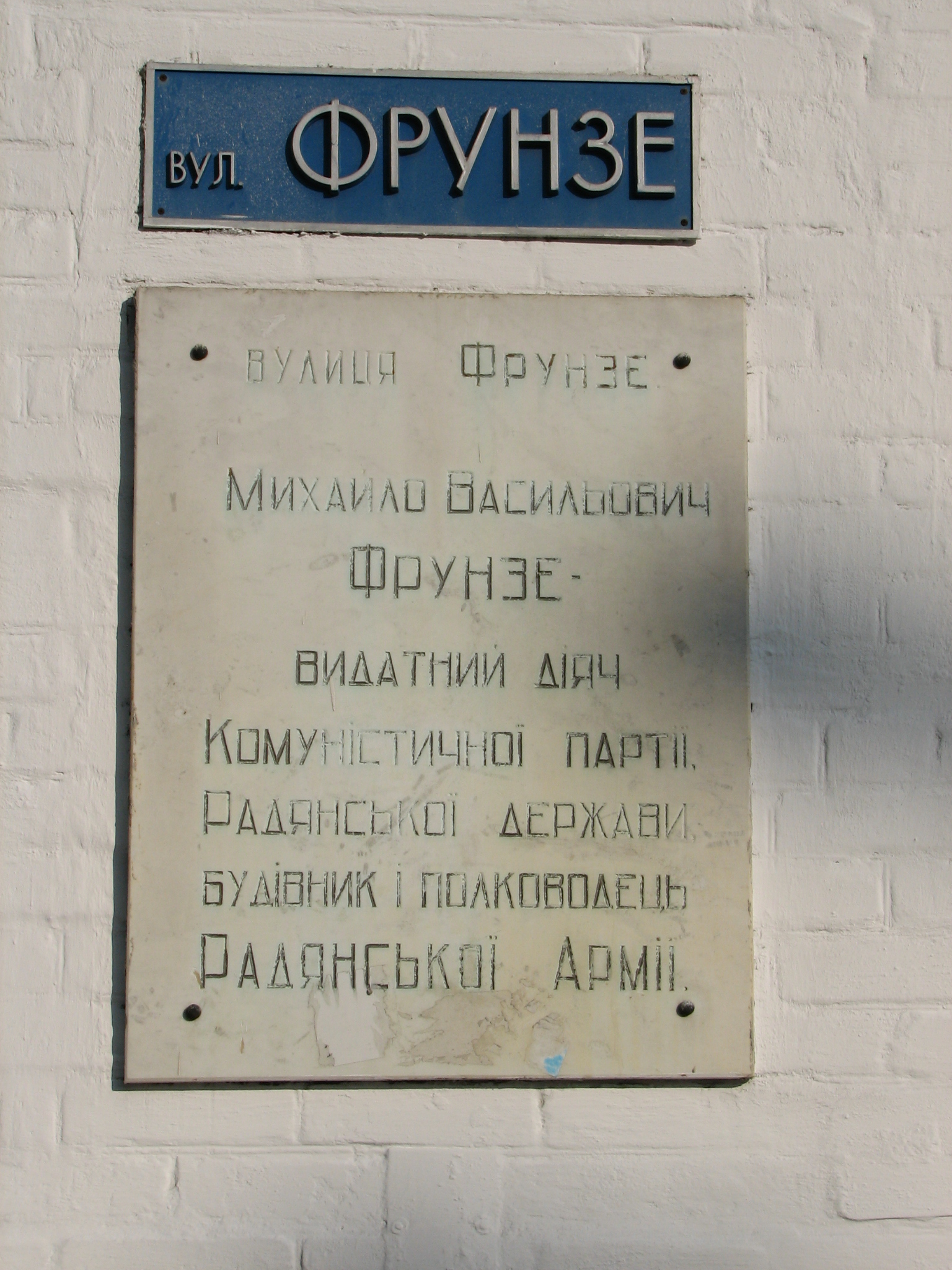 М.В.Фрунзе видатний діяч комуністичної партії